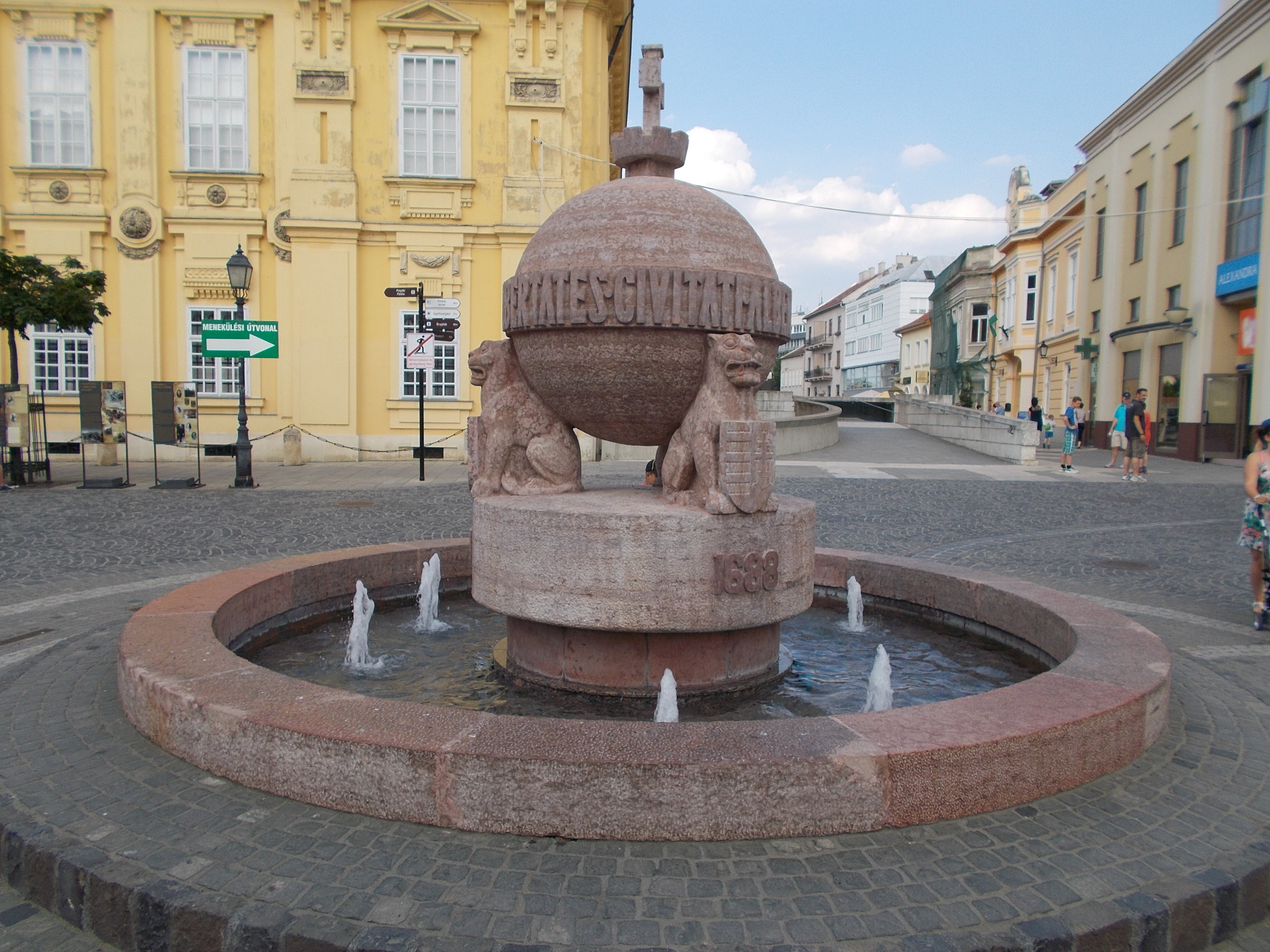 Országalma. A gömbön körbefutó felirat: 'Libertates Civitatis Albensis a S. rege Stephano concessa' - 'Fehérvár szabadságjogait Szent István adományozta'. Alkotó: Ohmann Béla, 1943. - Magyarország, Fejér megye, Székesfehérvár, Belváros, Városház tér